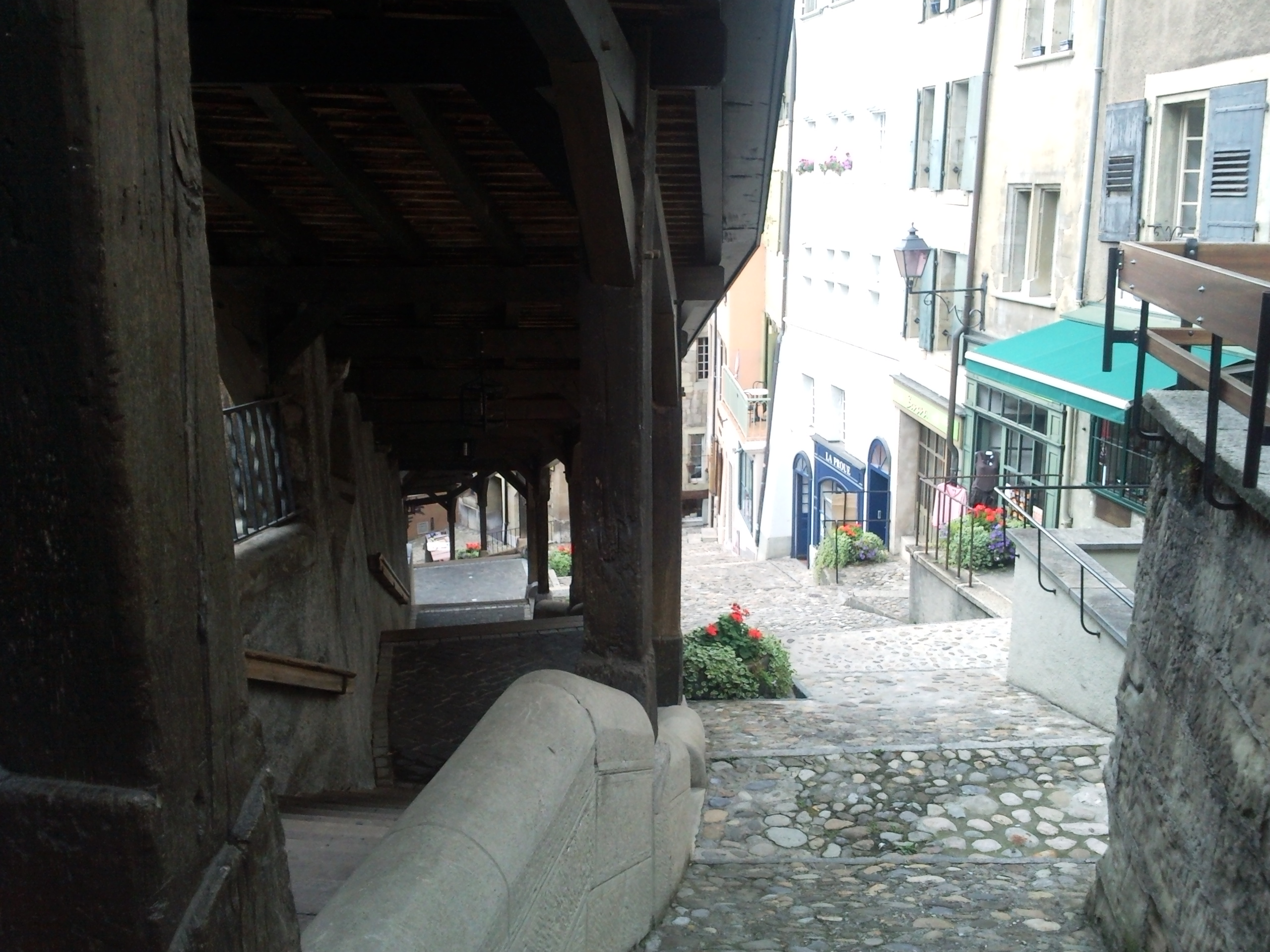 Les Escaliers du Marché (Lausanne).